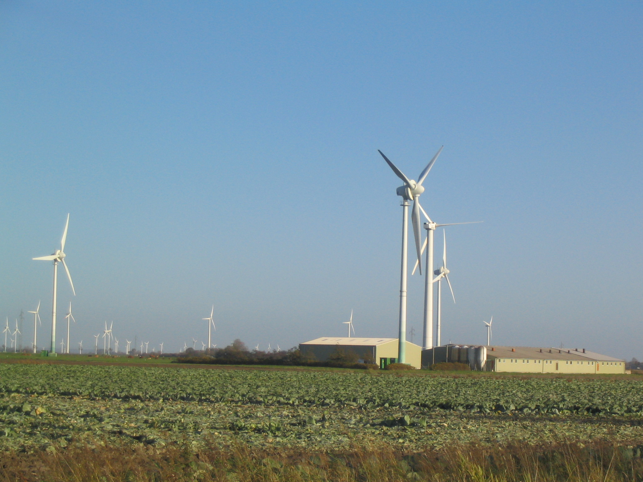 Wind turbines in Hellschen-Heringsand-Unterschaar, Dithmarschen. Picture taken in Westerkoog, Dithmarschen, Schleswig-Holstein, Germany.